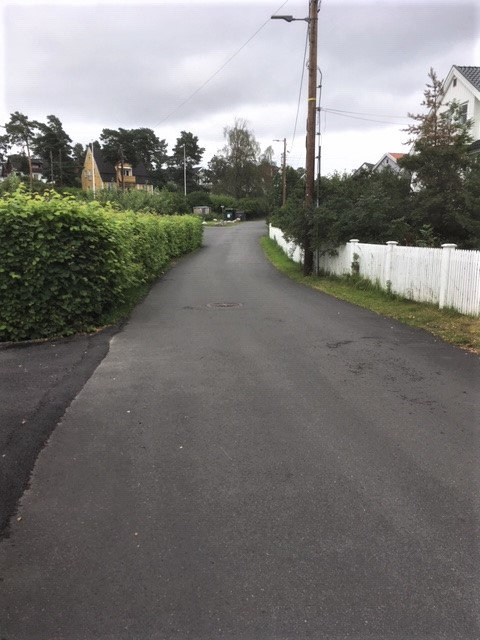 Cappelens vei i Oslo august 2019